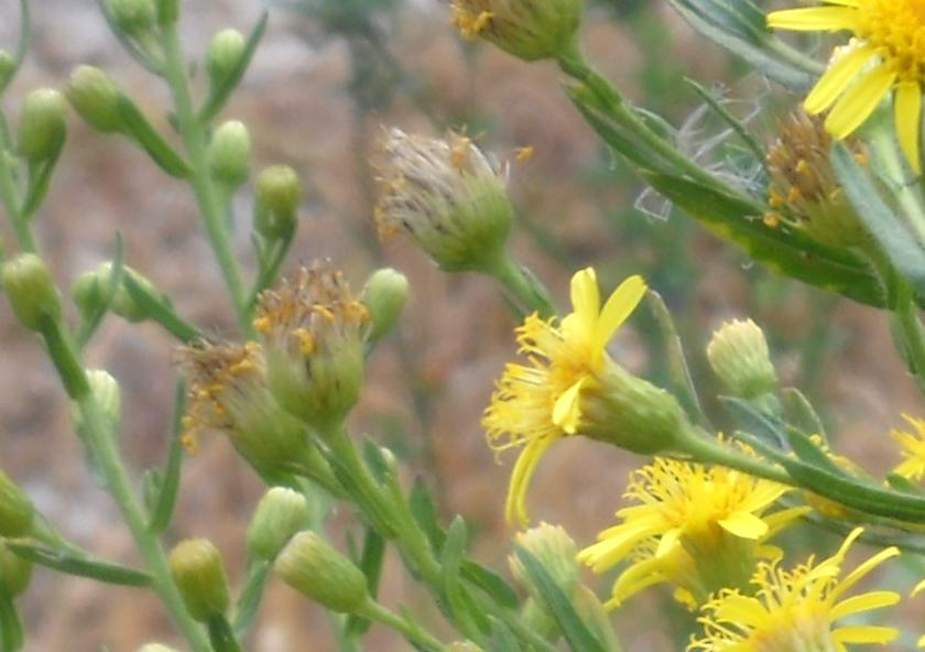 Un captitule parasité par Myopites stylata